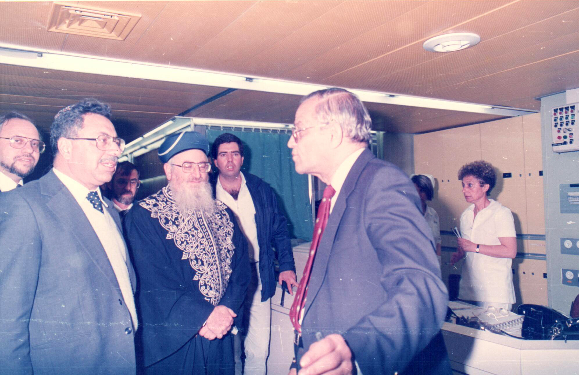 מרדכי אליהו ומשה גרון